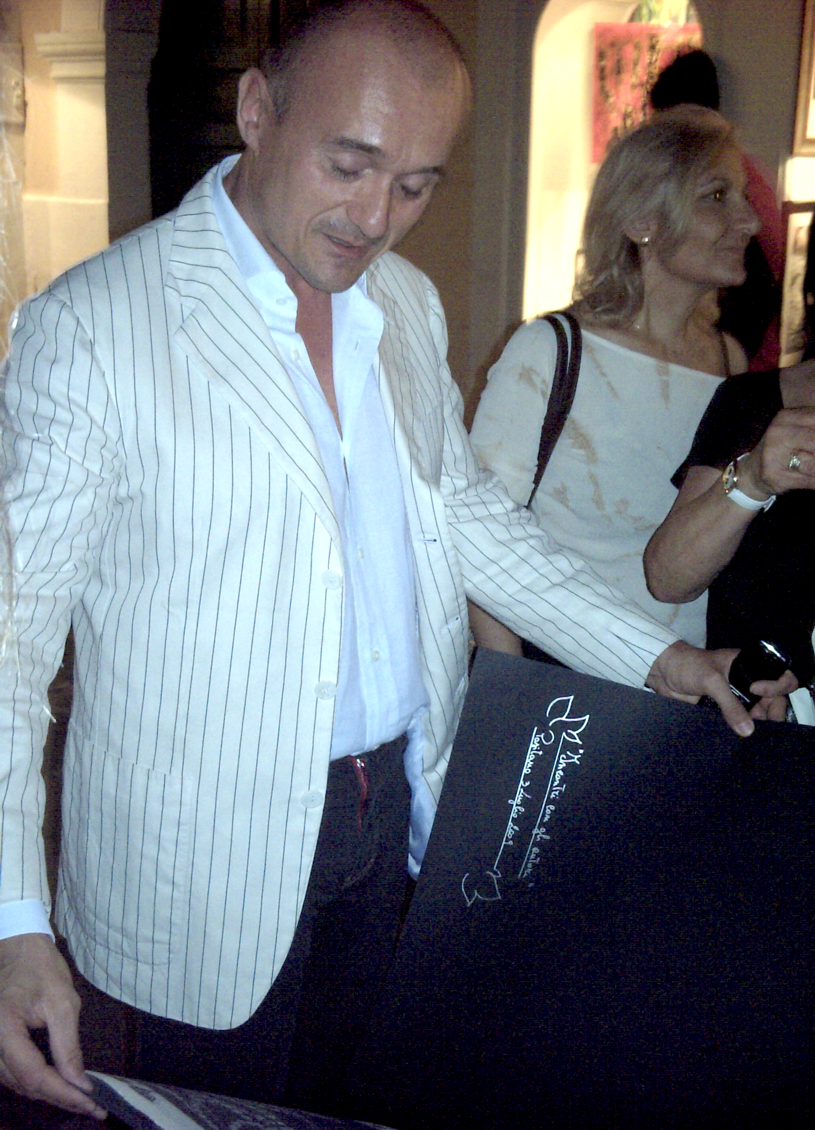 Alfonso Signorini durante la manifestazione "incontro con l'autore" il 3 luglio 2009 a Positano mentre riceve in dono dei lavori dell'Istituto Statale d'Arte di Cerreto Sannita (Bn)